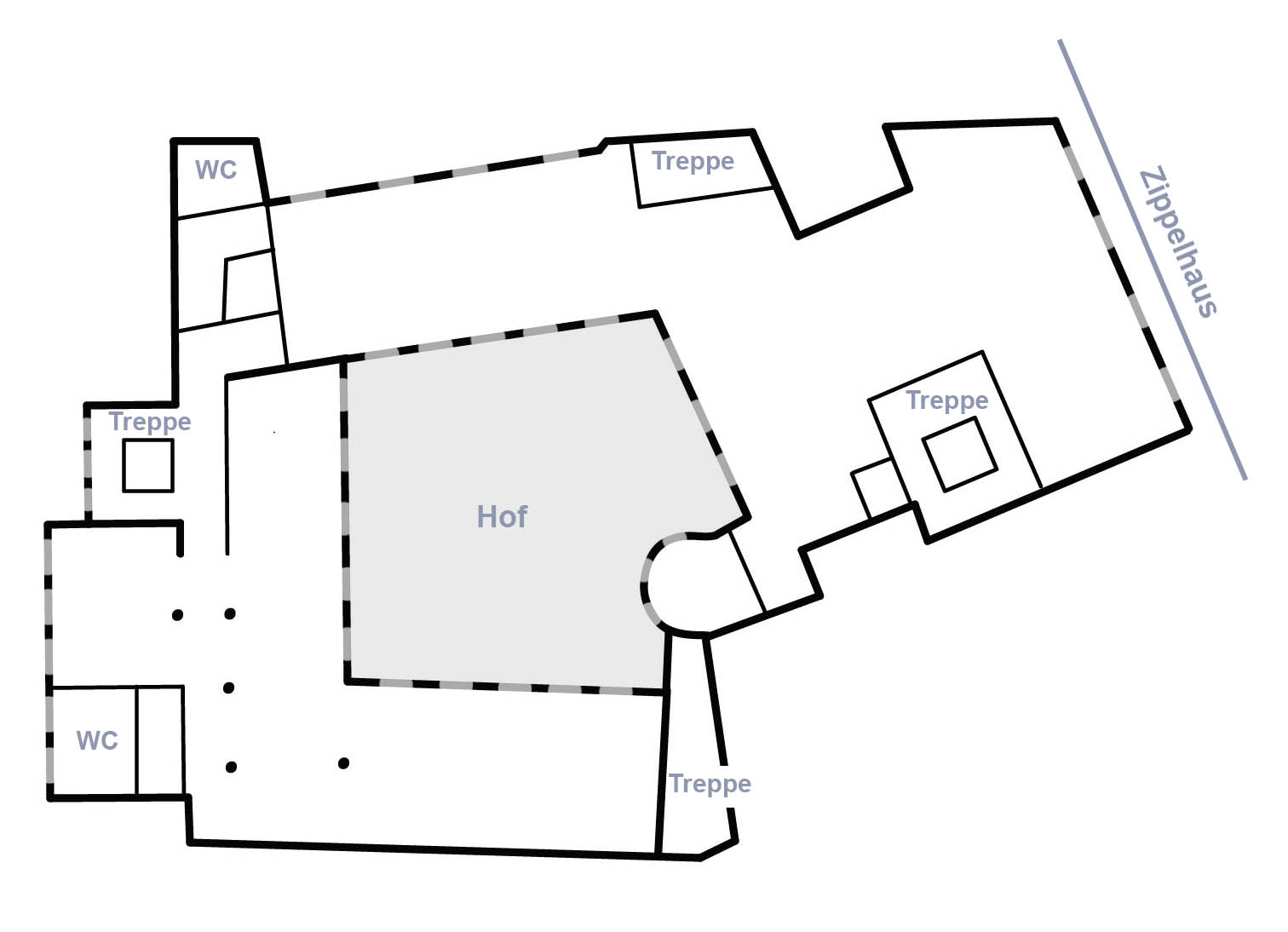 Hamburg-Altstadt, ehem. Nobelshof, Zippelhaus 5, Grundrissskizze Obergeschoss, Foto: 2016